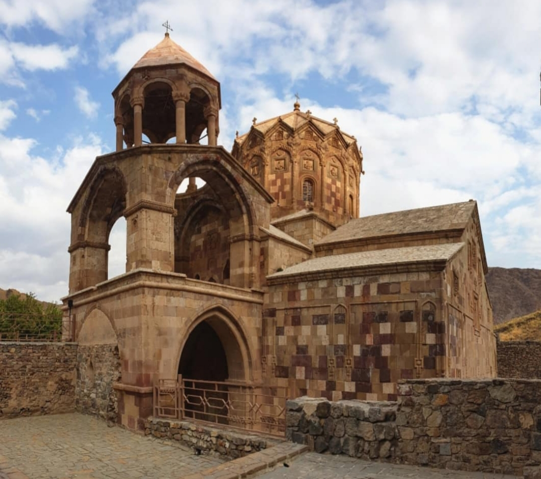 کلیسای استفانوس مقدس